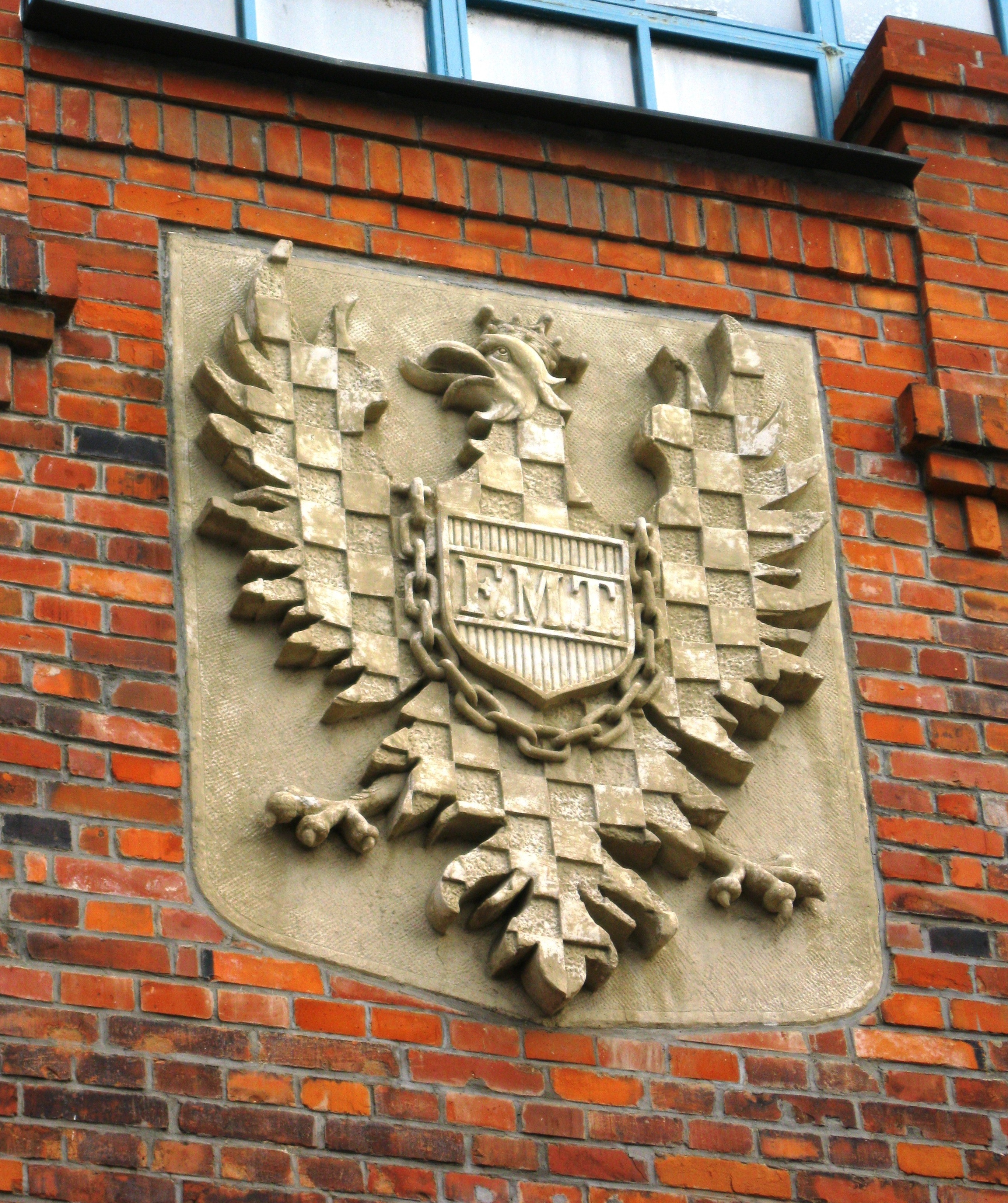 Tržnice dobytčí (Olomouc), Pasteurova 905/10, Olomouc